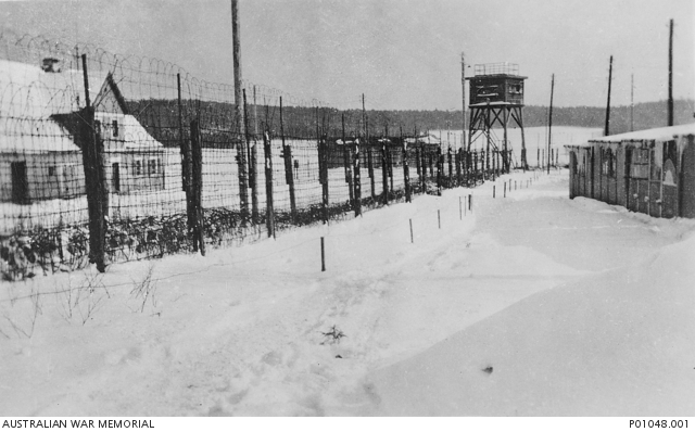 Stalag 383 - Hohenfels - Wachturm